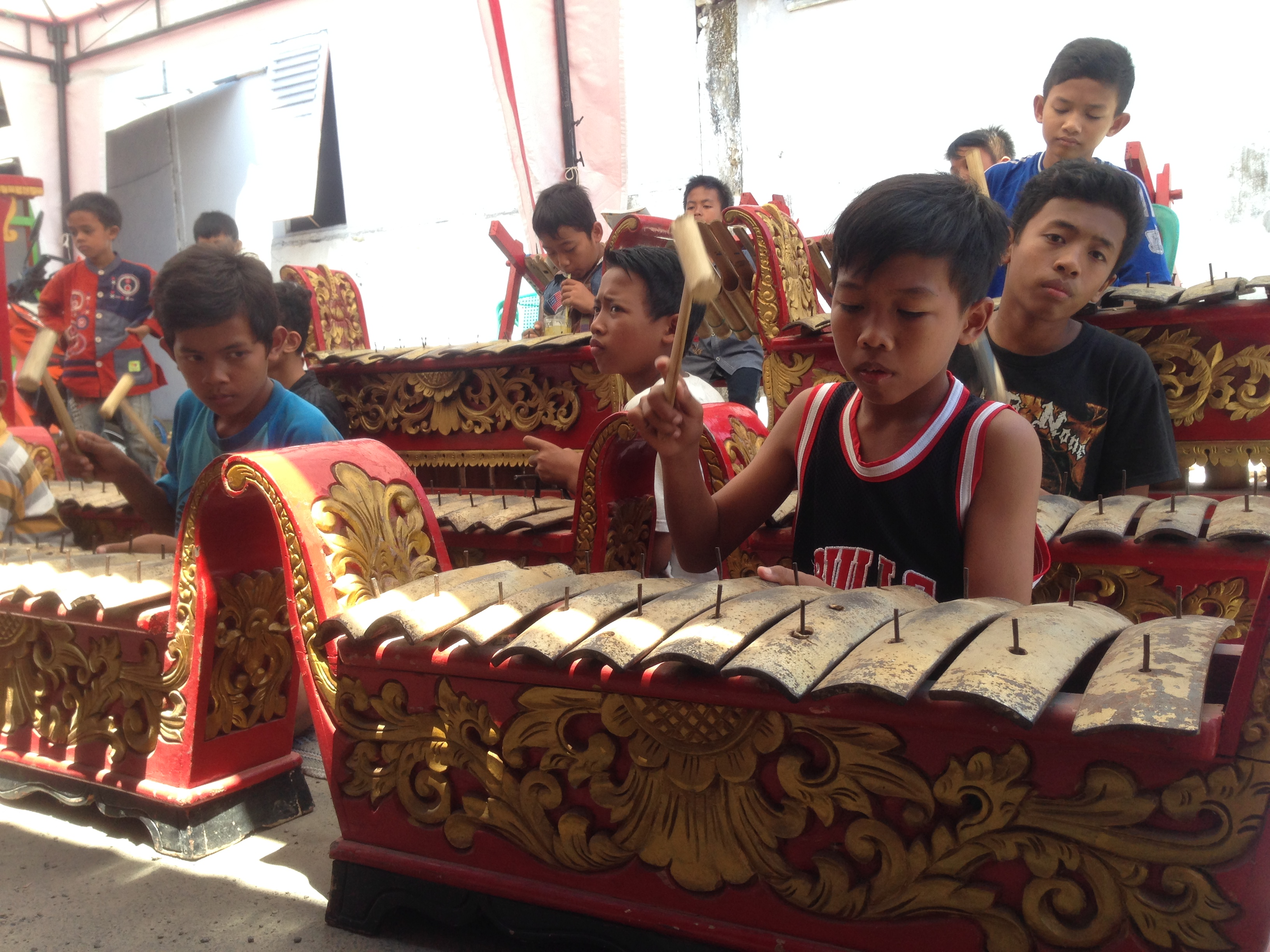 gamelan Banyuwangi yang dimainkan oleh anak-anak kcil di Kampong Temenggungan